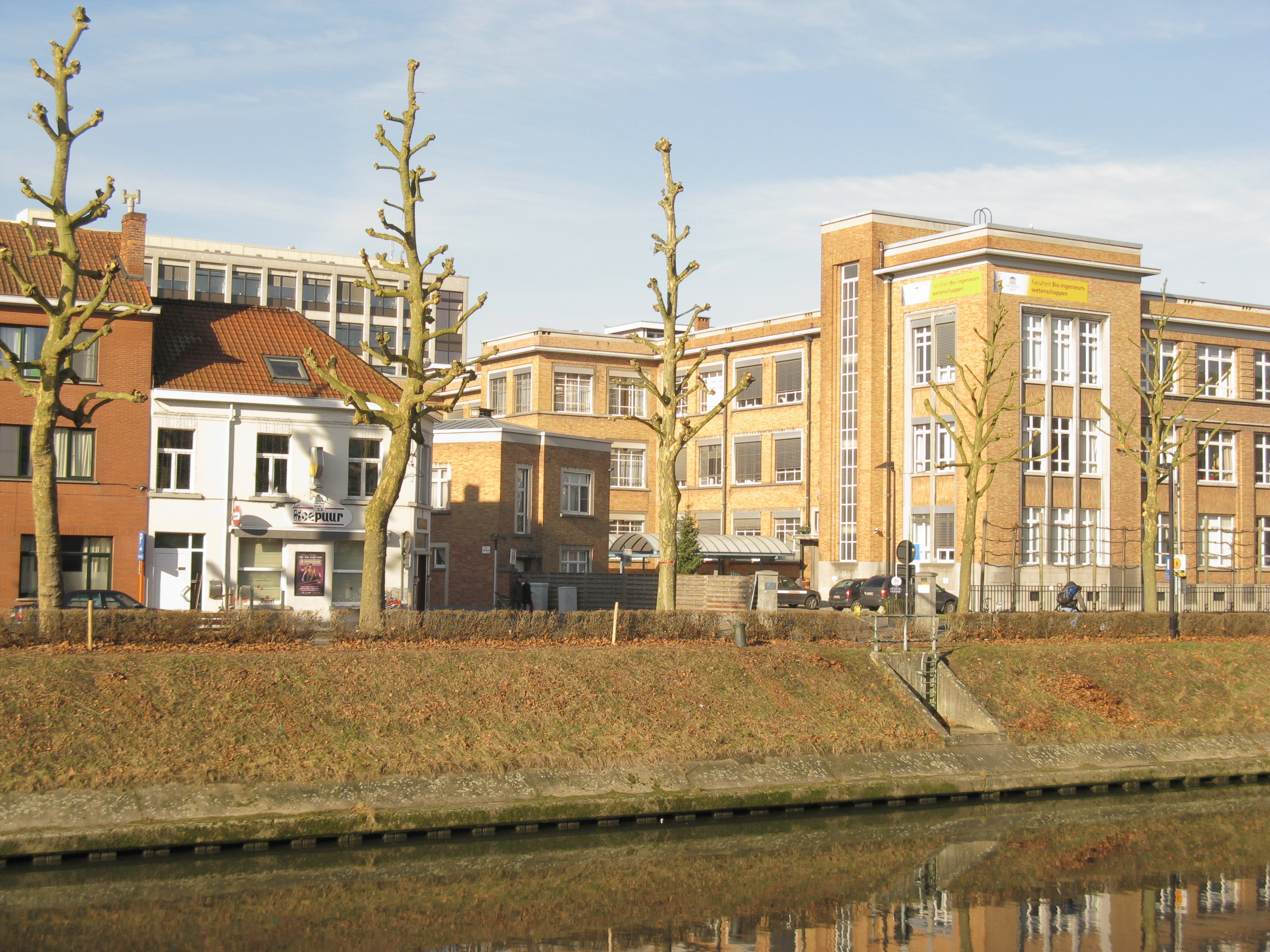 Coupure, Gent, België.